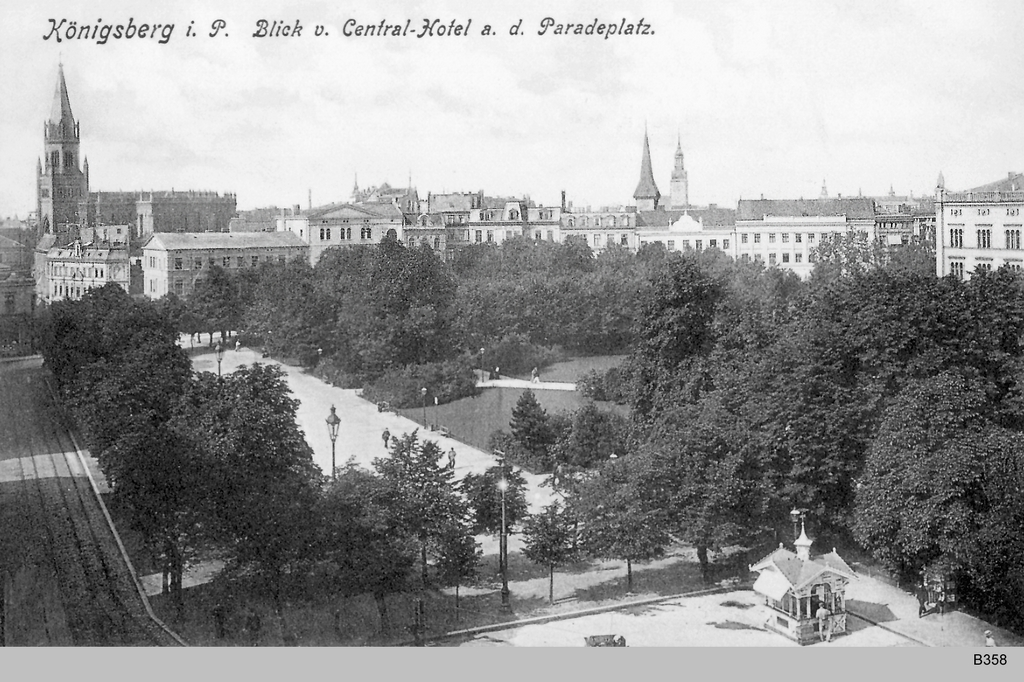 Königsberg